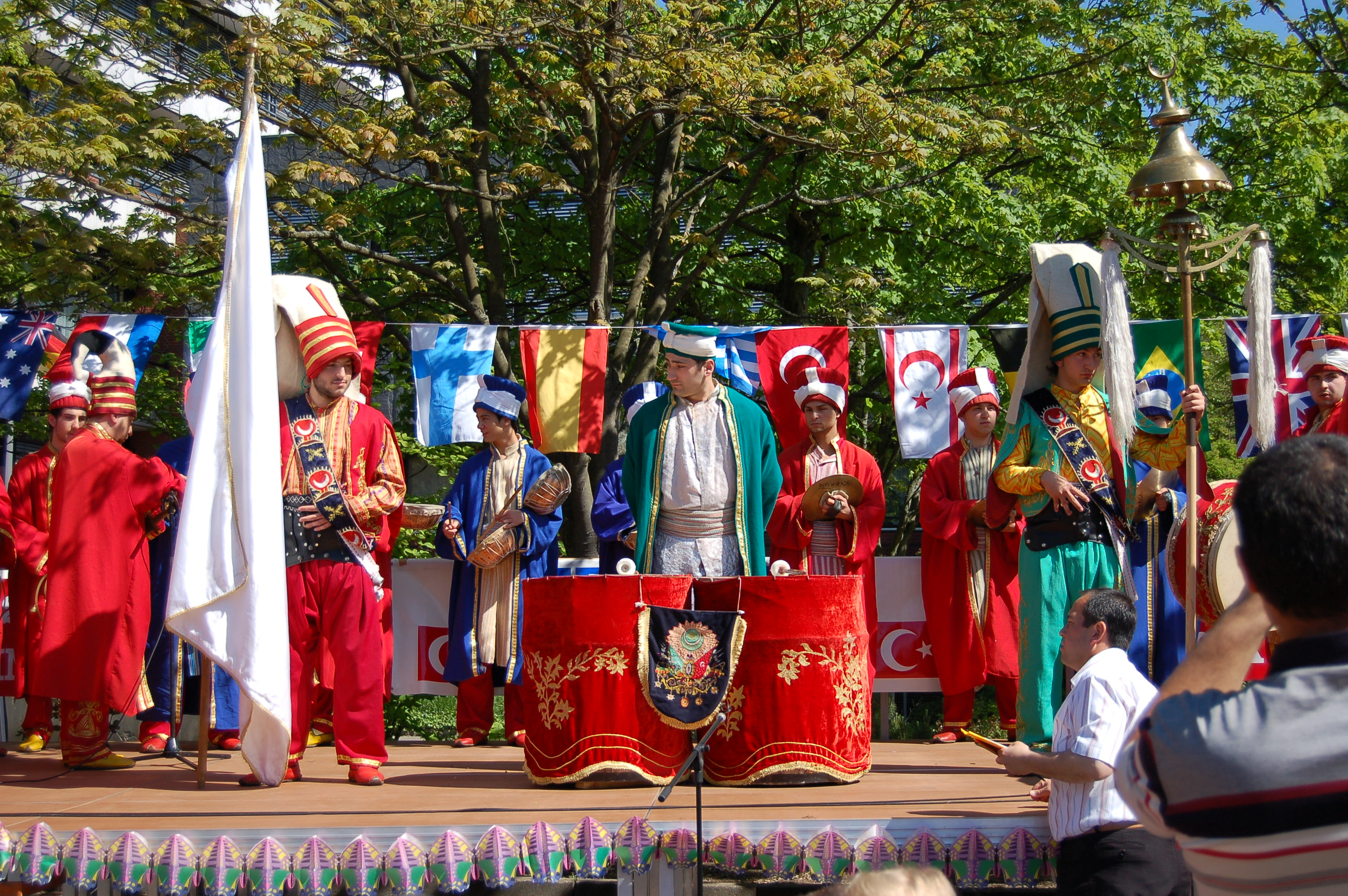 Türkisches Kinderfest 2007 in Uetersen